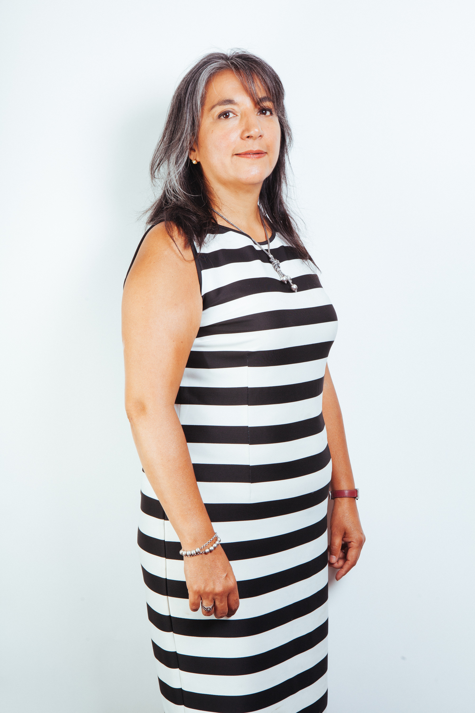 Ministro de Estado del segundo gobierno de Michelle Bachelet (2014-2018)